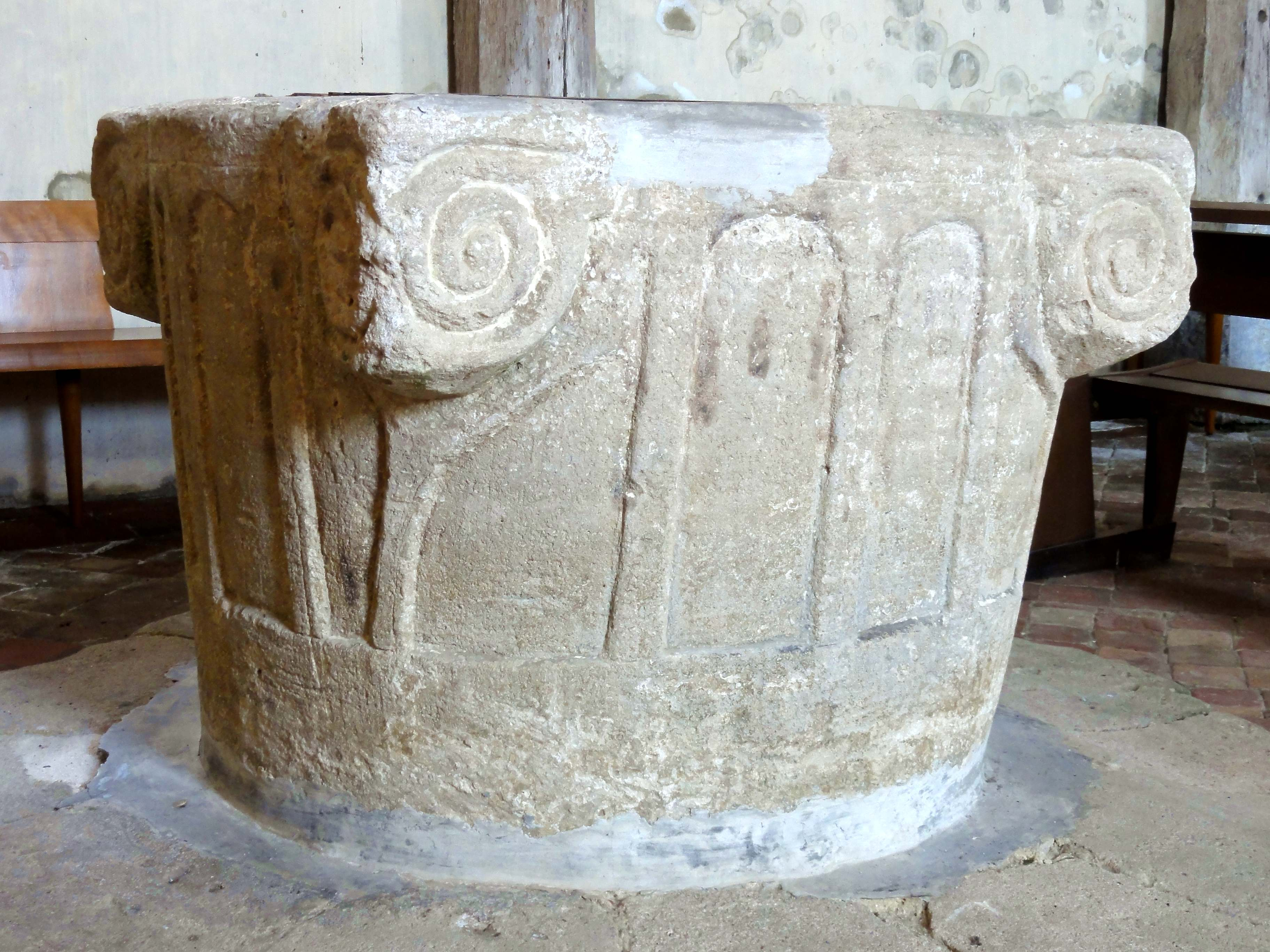 Fonts baptismaux, fin XIe / début XIIe siècle.